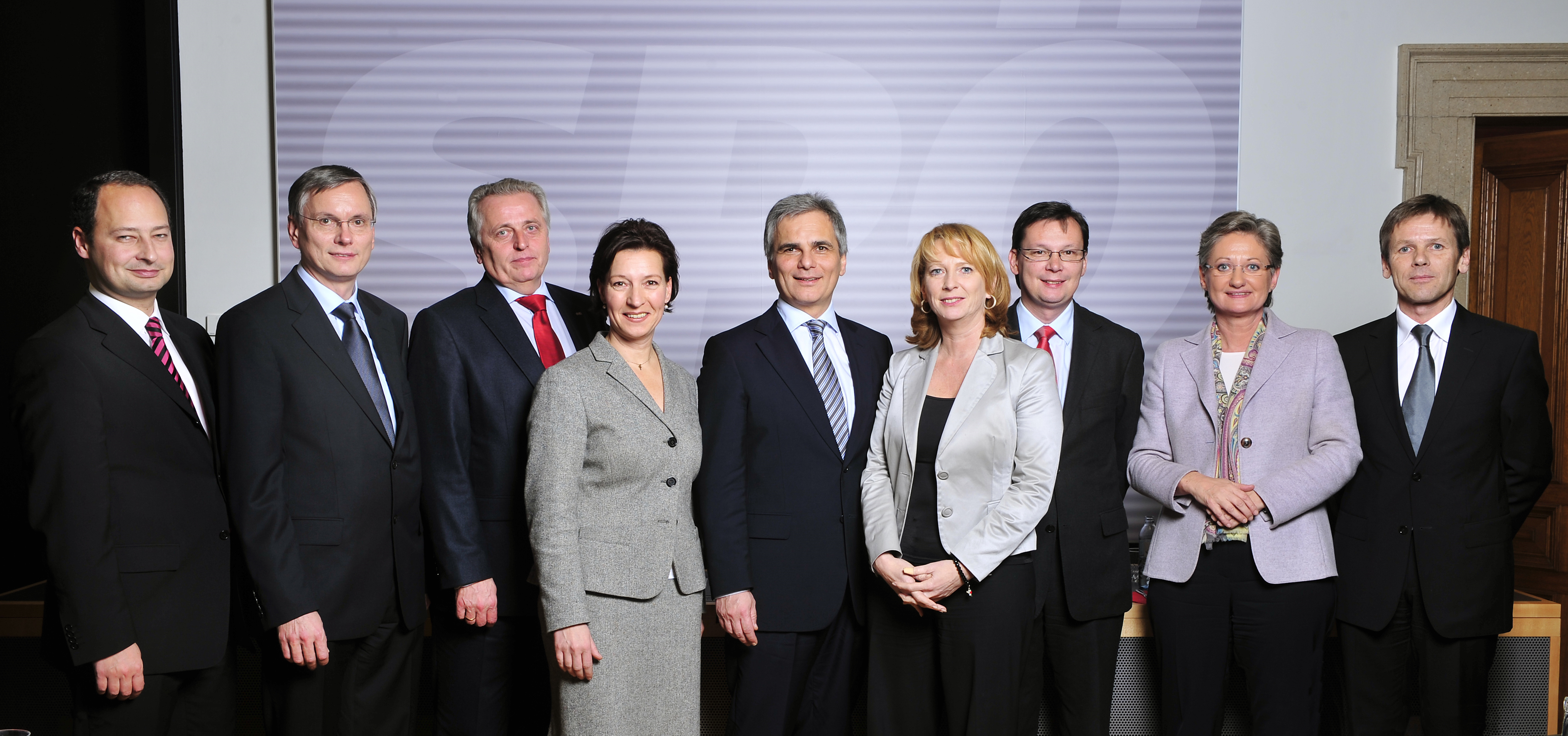 Das SPÖ-Regierungsteam: Mag. Andreas Schieder, Diplômé Alois Stöger, Rudolf Hundstorfer, Gabriele Heinisch-Hosek, Werner Faymann, Doris Bures, Mag. Norbert Darabos, Drin. Claudia Schmied, Dr. Josef Ostermayer (v.l.n.r.) (Foto:Zinner)